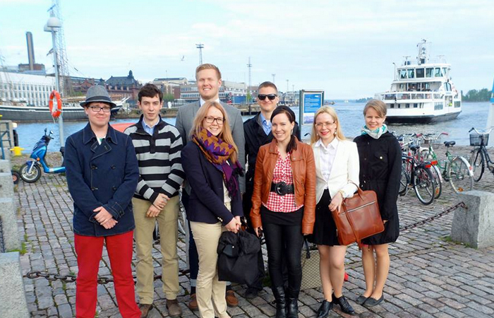 KD Nuorten hallitus kauppatorilla